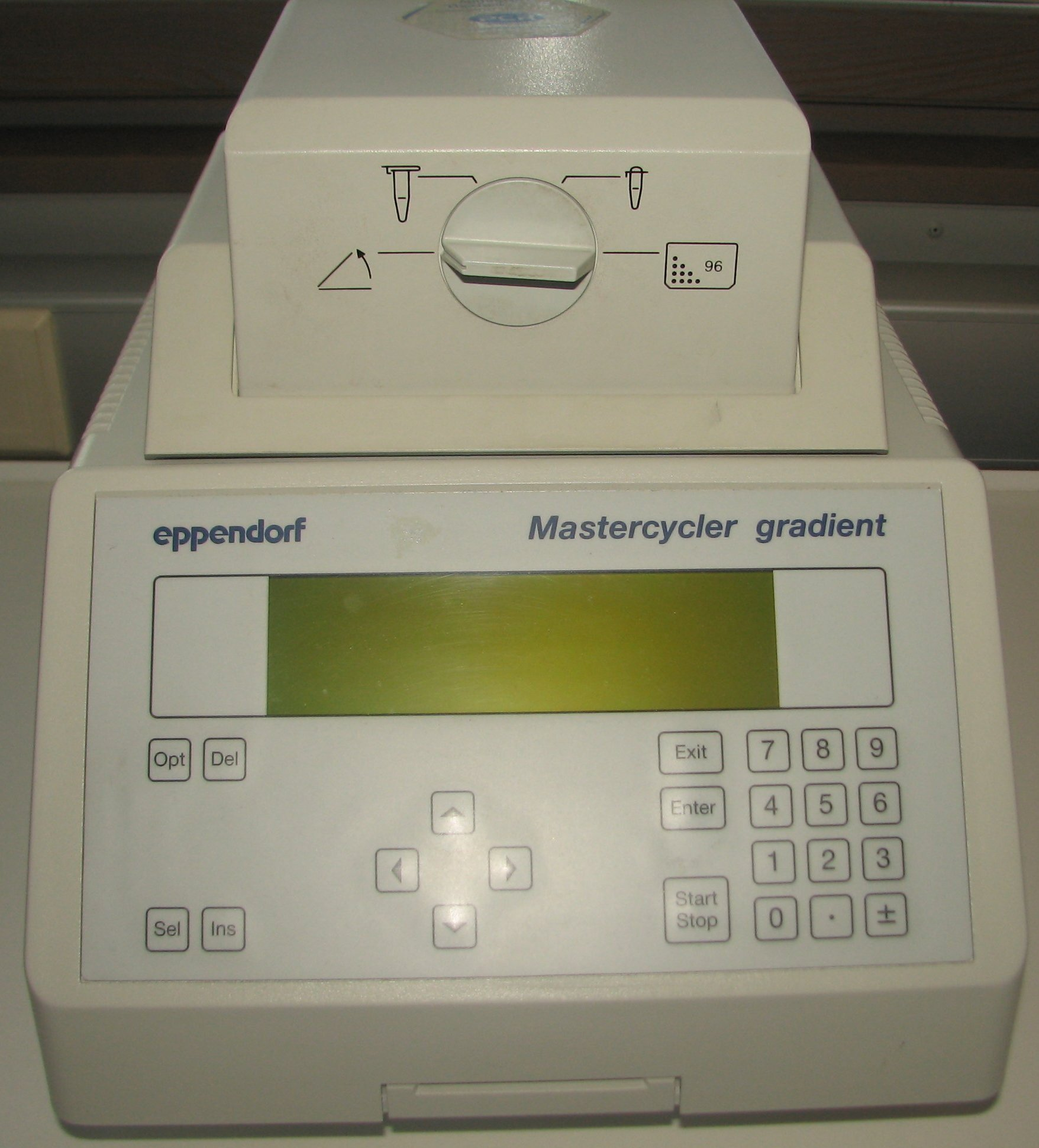 Прибор для проведения ПЦР